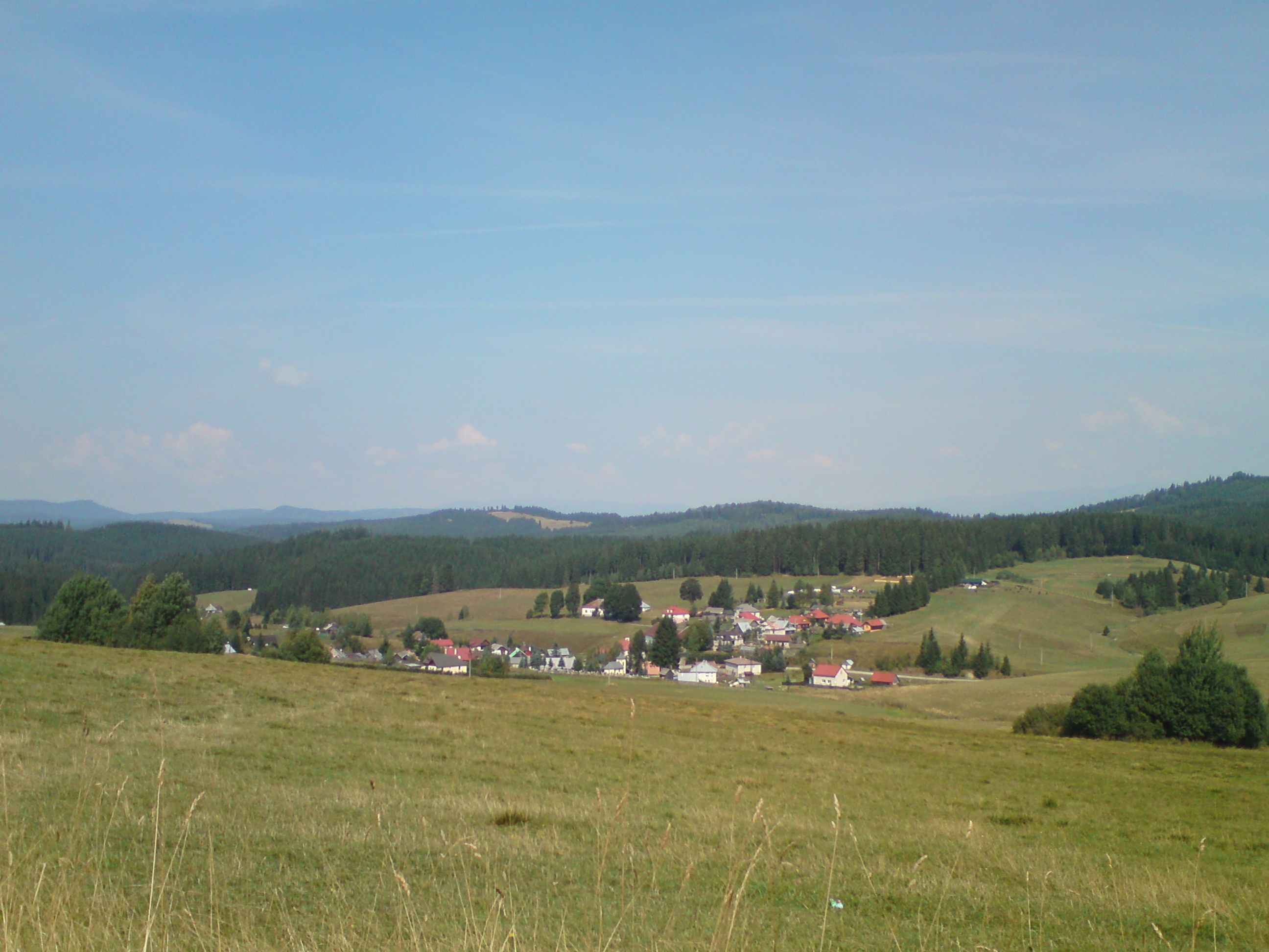 Pohľad na obec